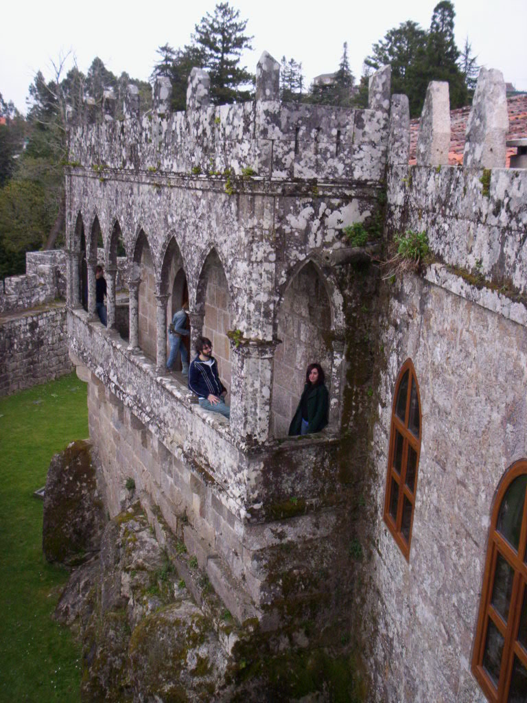 Castelo de Soutomaior - Galería das Damas - Soutomaior - Pontevedra